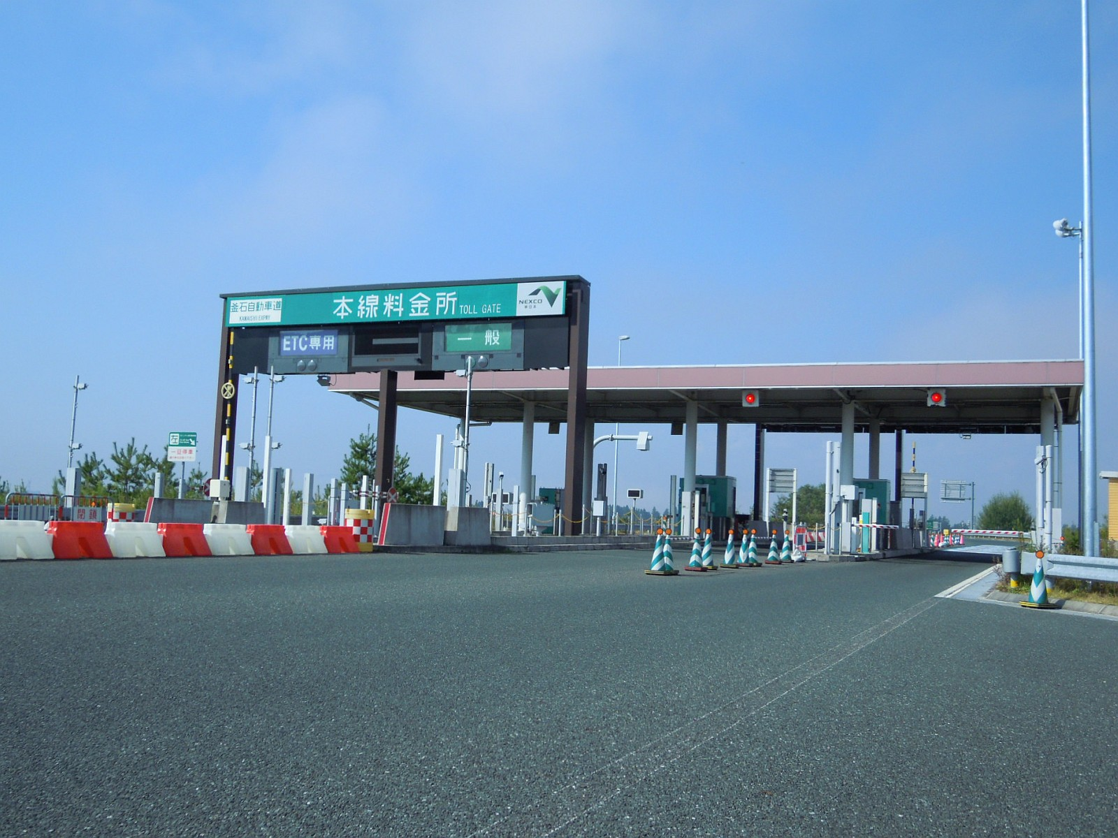 釜石自動車道花巻空港本線料金所を東和インターチェンジ側から